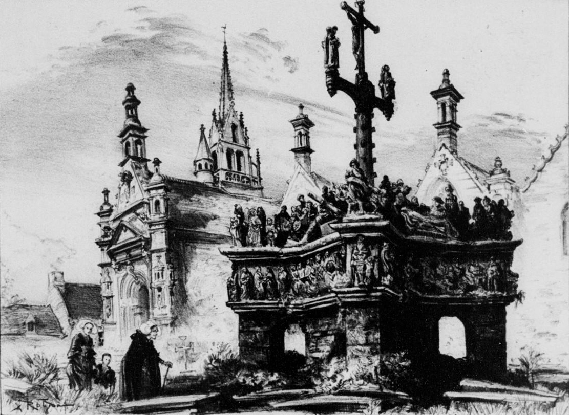 Le calvaire de Guimiliau vers 1900 (lithographie d'Albert Robida publiée dans "La vieille France, Bretagne" vers 1900)